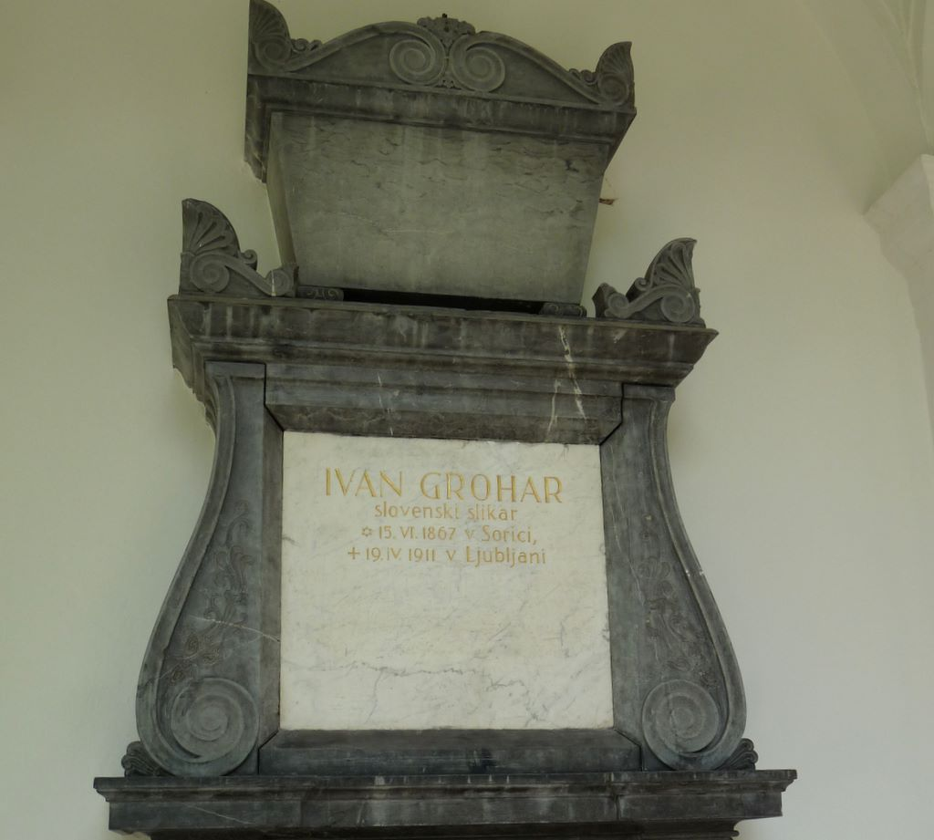 Ivan Grohar, nagrobnik na Navju, narejen morda ob koncu 1860. let. Marmornata plošča iz leta 1939.